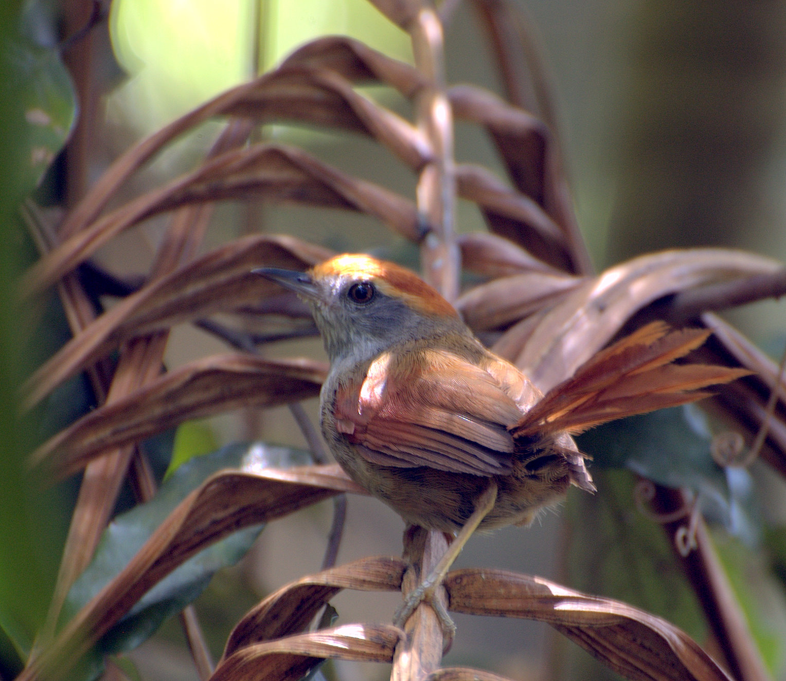 Jardim Botânico de São Paulo